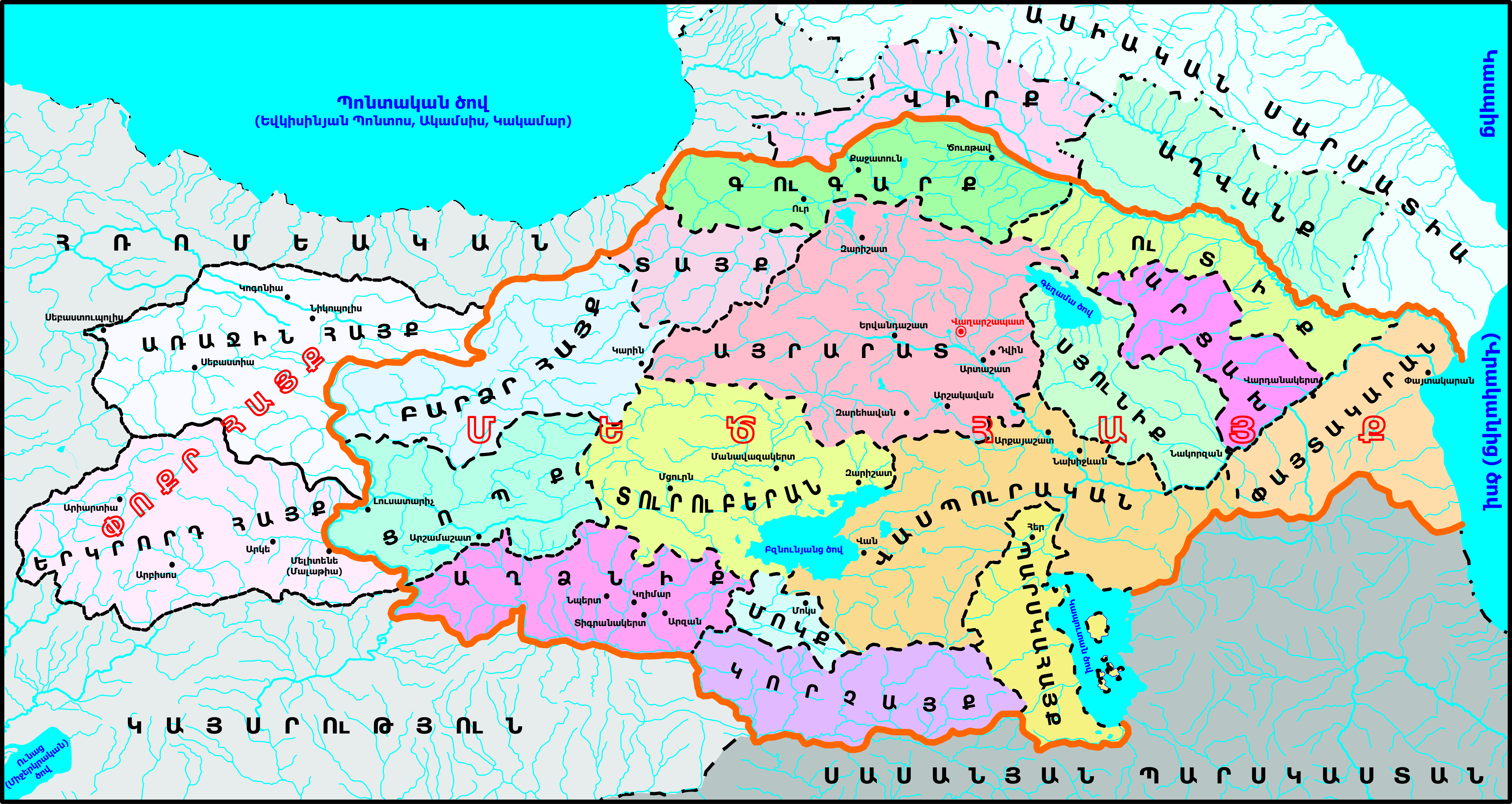 Մեծ և Փոքր Հայքերը, համաձայն «Աշխարհացույցի»։ Քարտեզը գծանկարվել է հիմնվելով Բ.Գ. Հարությունյանի կողմից ստեղծված քարտեզի վրա։